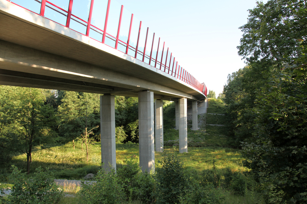 Brücke der S177 im Hüttertal